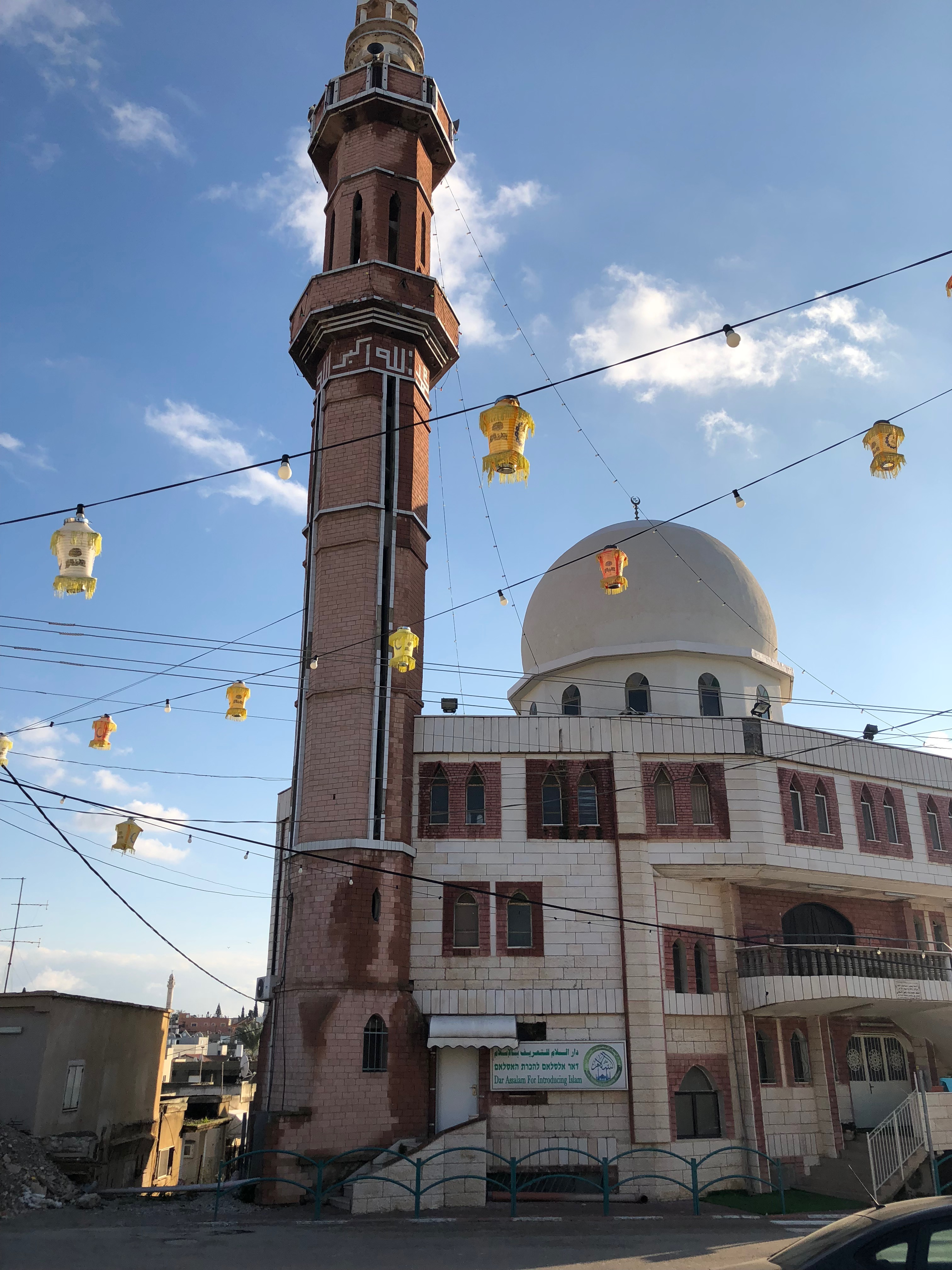 תמונה של מסגד מכפר קרע, ינואר 2018